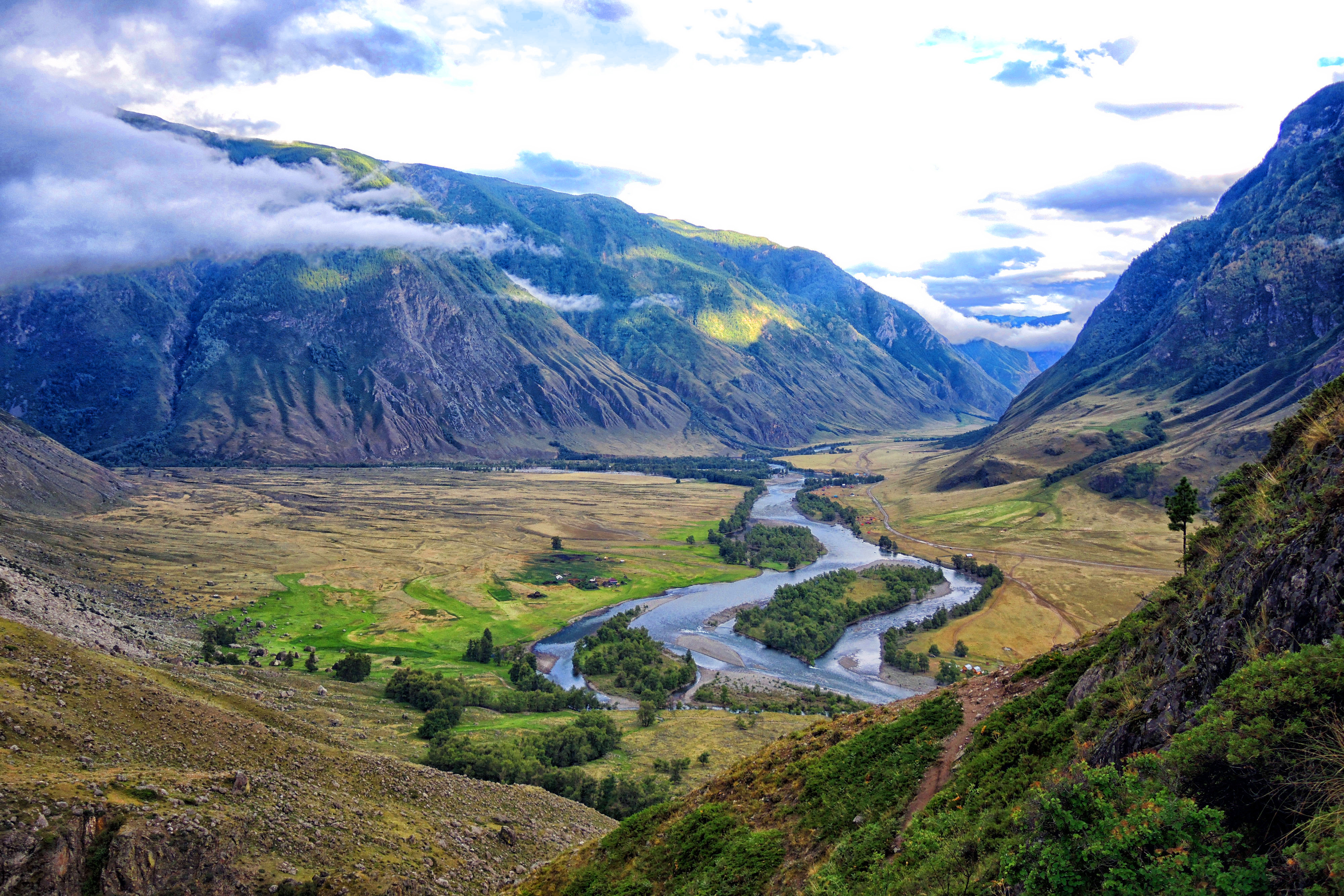 Чулышманский ландшафтный участок: Правобережье р. Чулышман, урочище Аккурум.,Коо,Улаганский район, Алтай This image is related to the protected area of Russia number 0410035